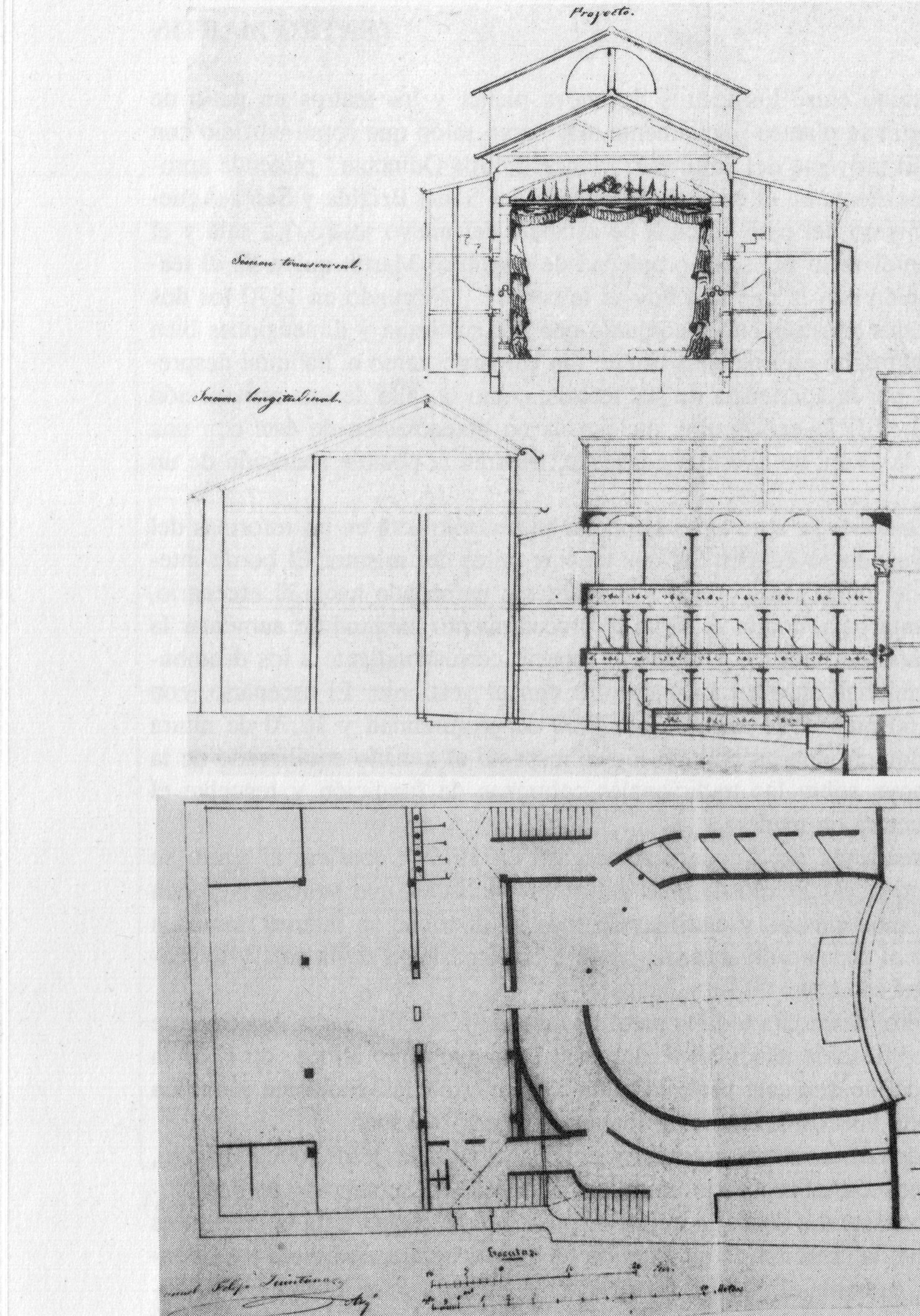 Proyecto de construcción del Teatro Martín de Madrid. Museo Municipal de Madrid.